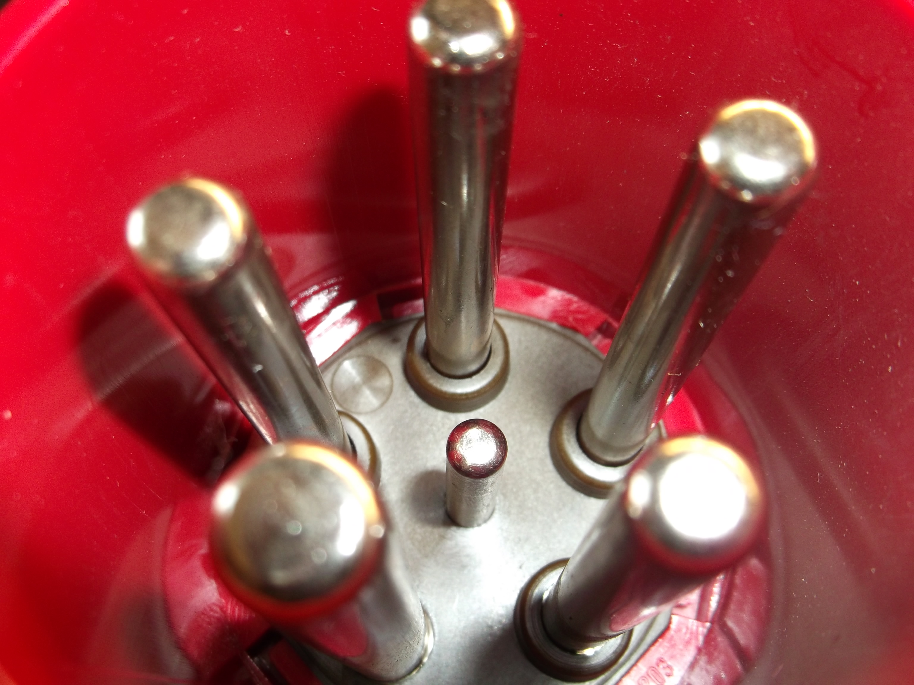 CEE 400V 63A 6h IP67 Drehstromsteckereinsatz mit Pilotkontakt.